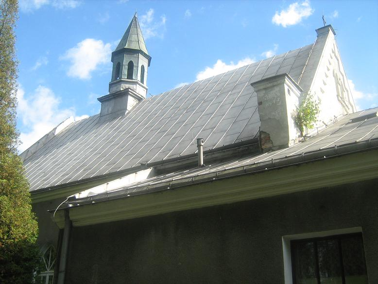 Former Mariavit Church in Warsaw (Poland) Stary kościół mariawicki w Warszawie